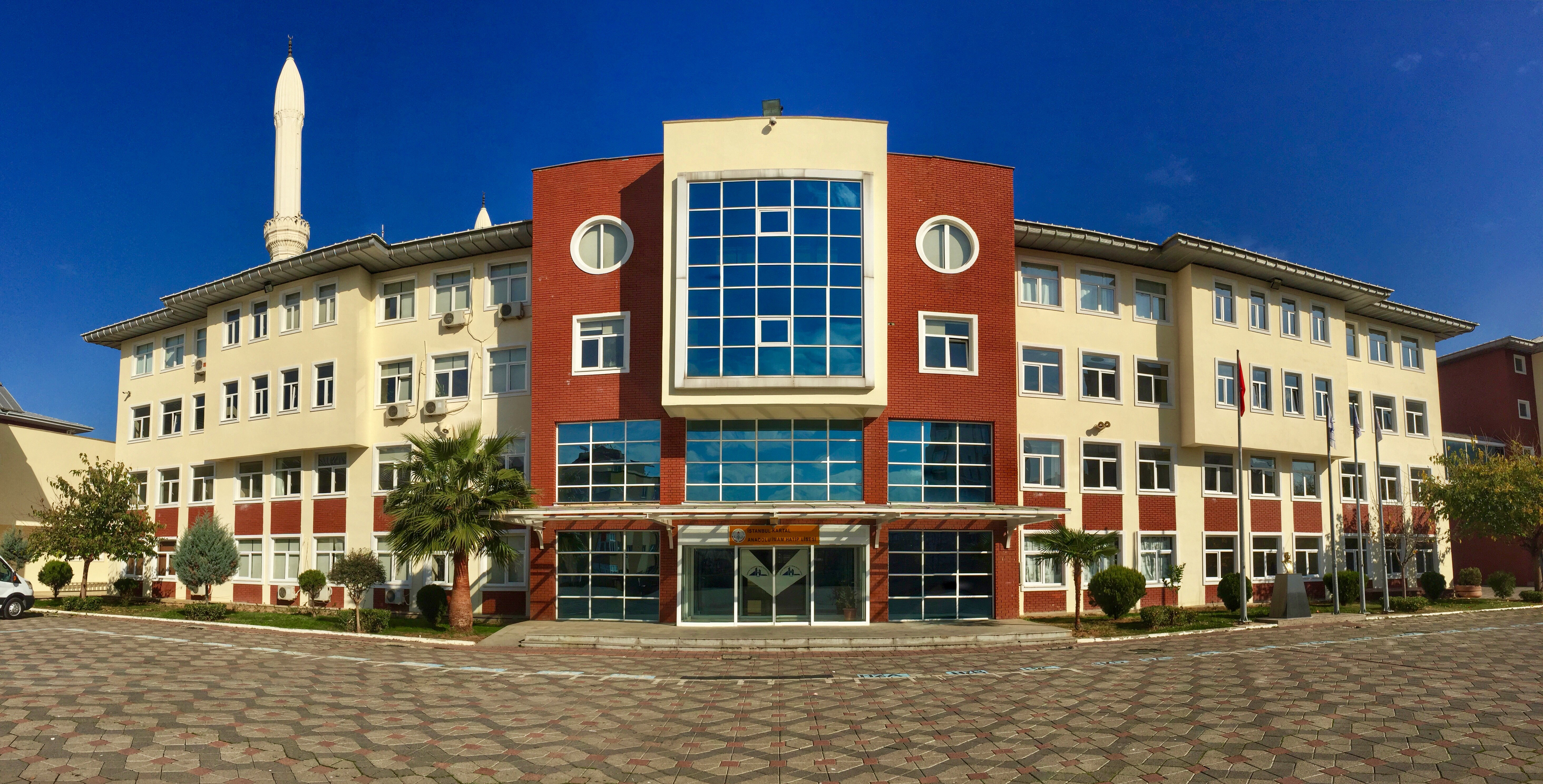 Kartal Anadolu İmam Hatip Lisesi A Blok Panoramik